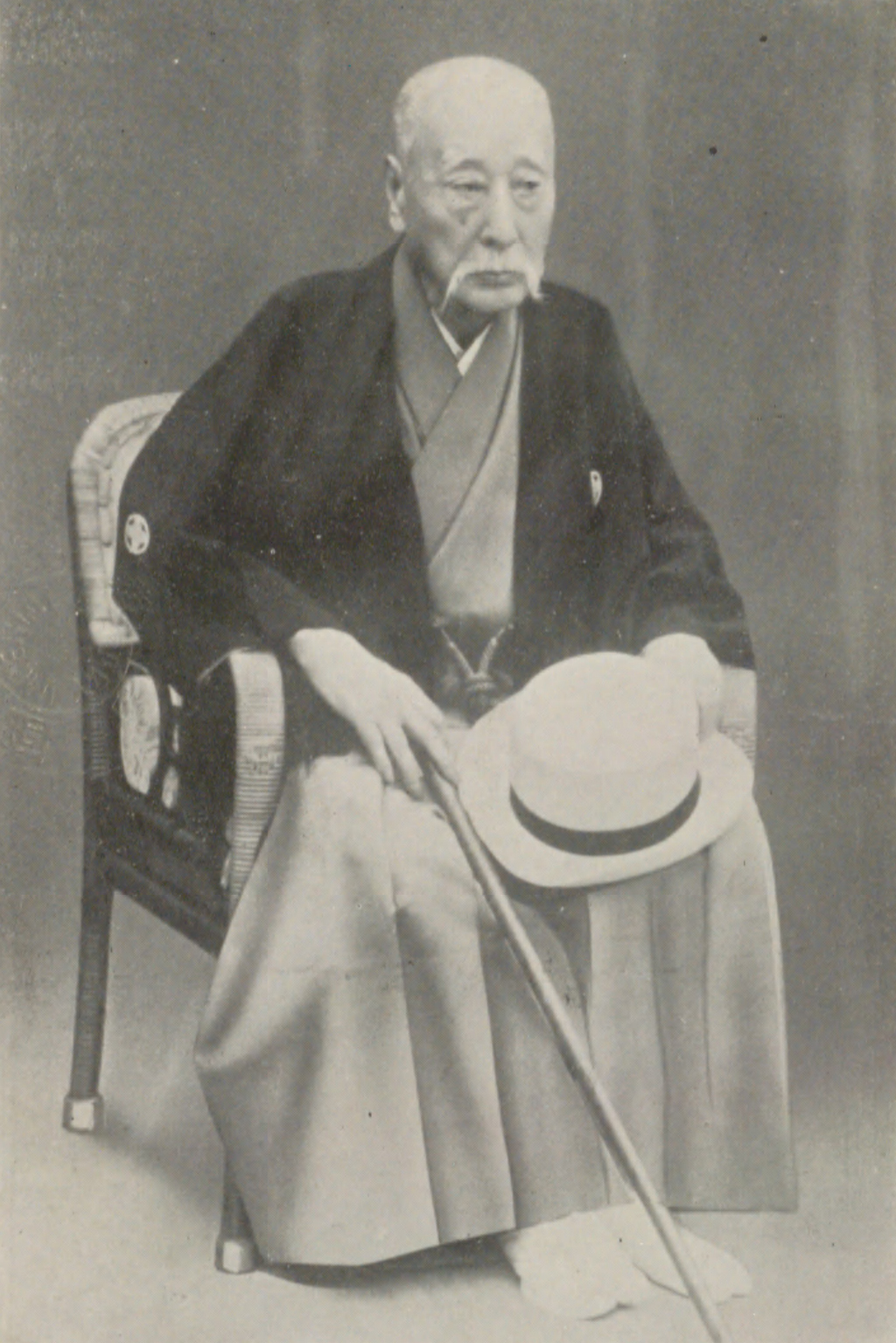 Portrait of Asano Nagakoto (浅野長勲, 1842 – 1937)